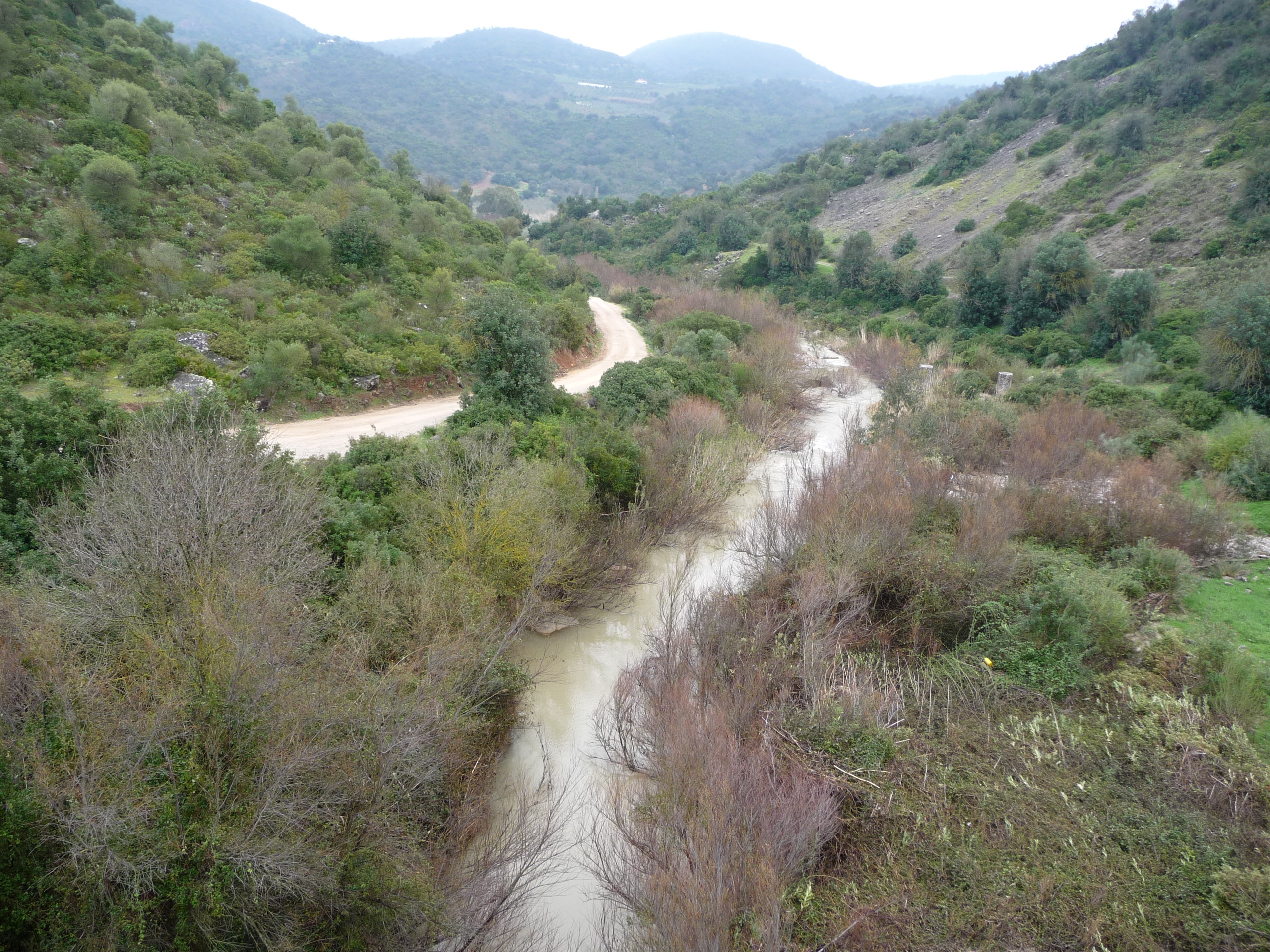 Guadalporcun-ViaVerdeDeLaSierra-p1010868.jpg